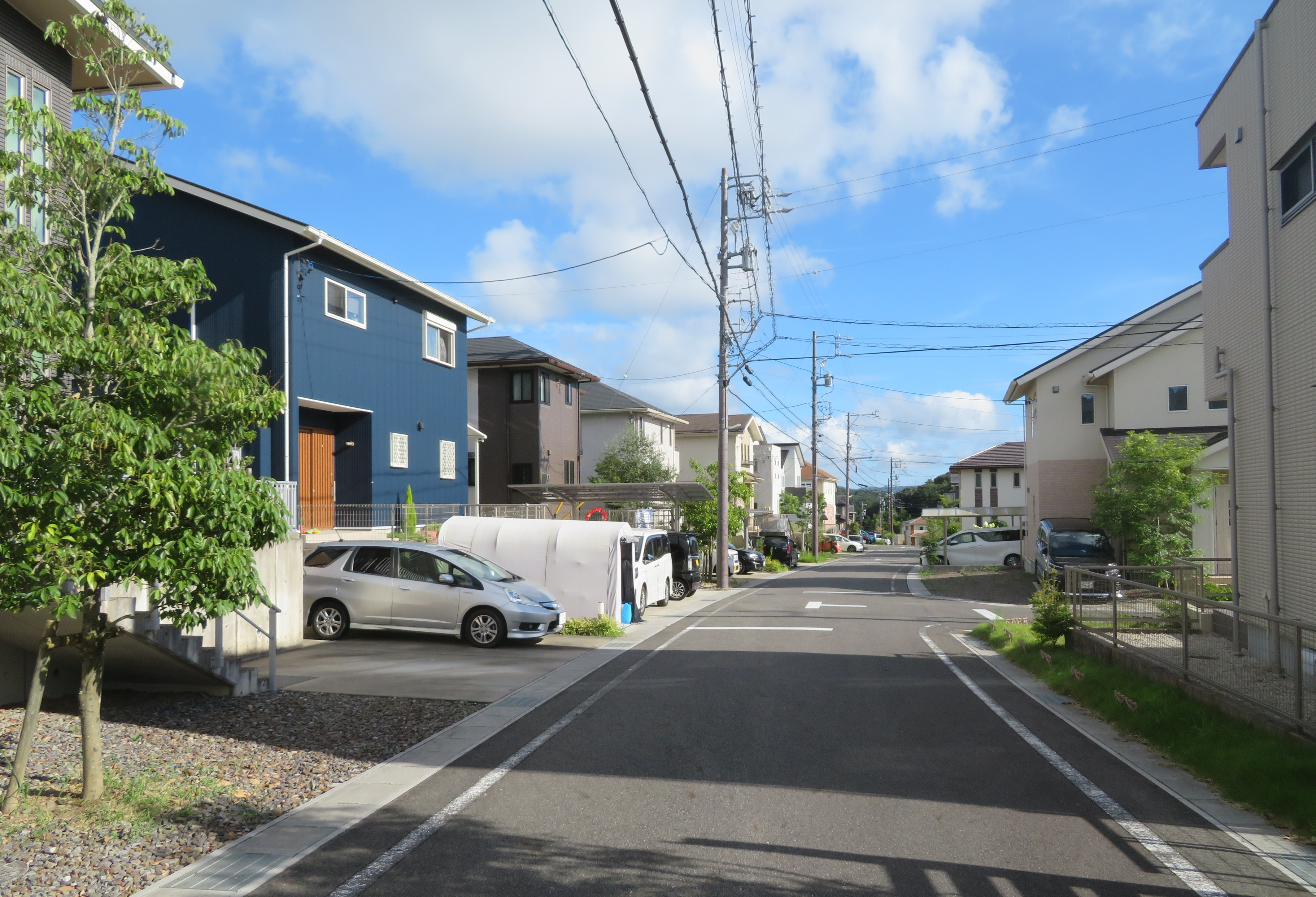 岡崎市田口町字若草で造成された分譲住宅地「エコロタウンときわ南」。2005年から造成工事が始まった。